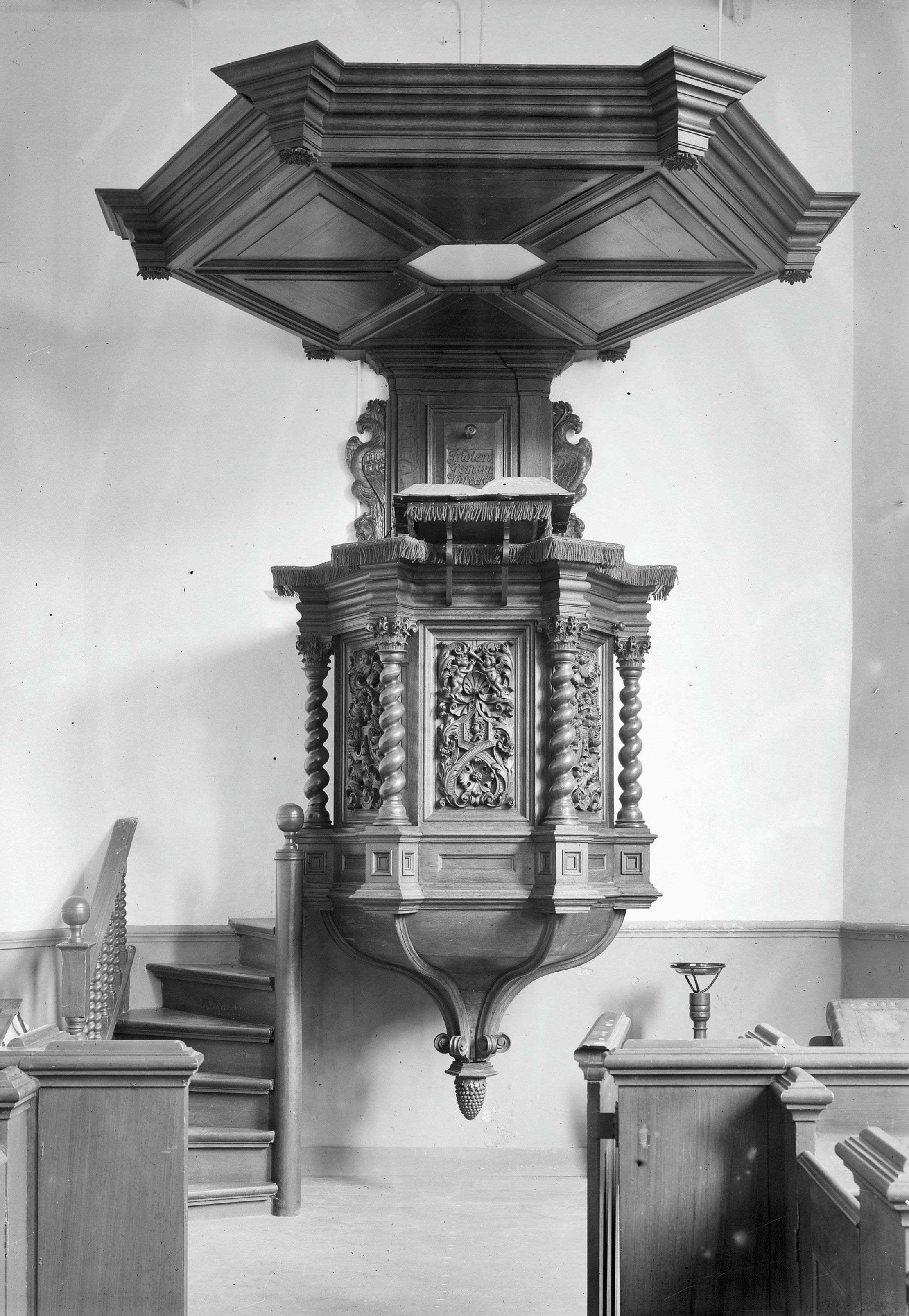 Nederlands Hervormde Kerk: preekstoel en zilver